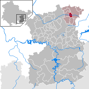 Miesitz in Thuringia - Saale-Orla-Kreis